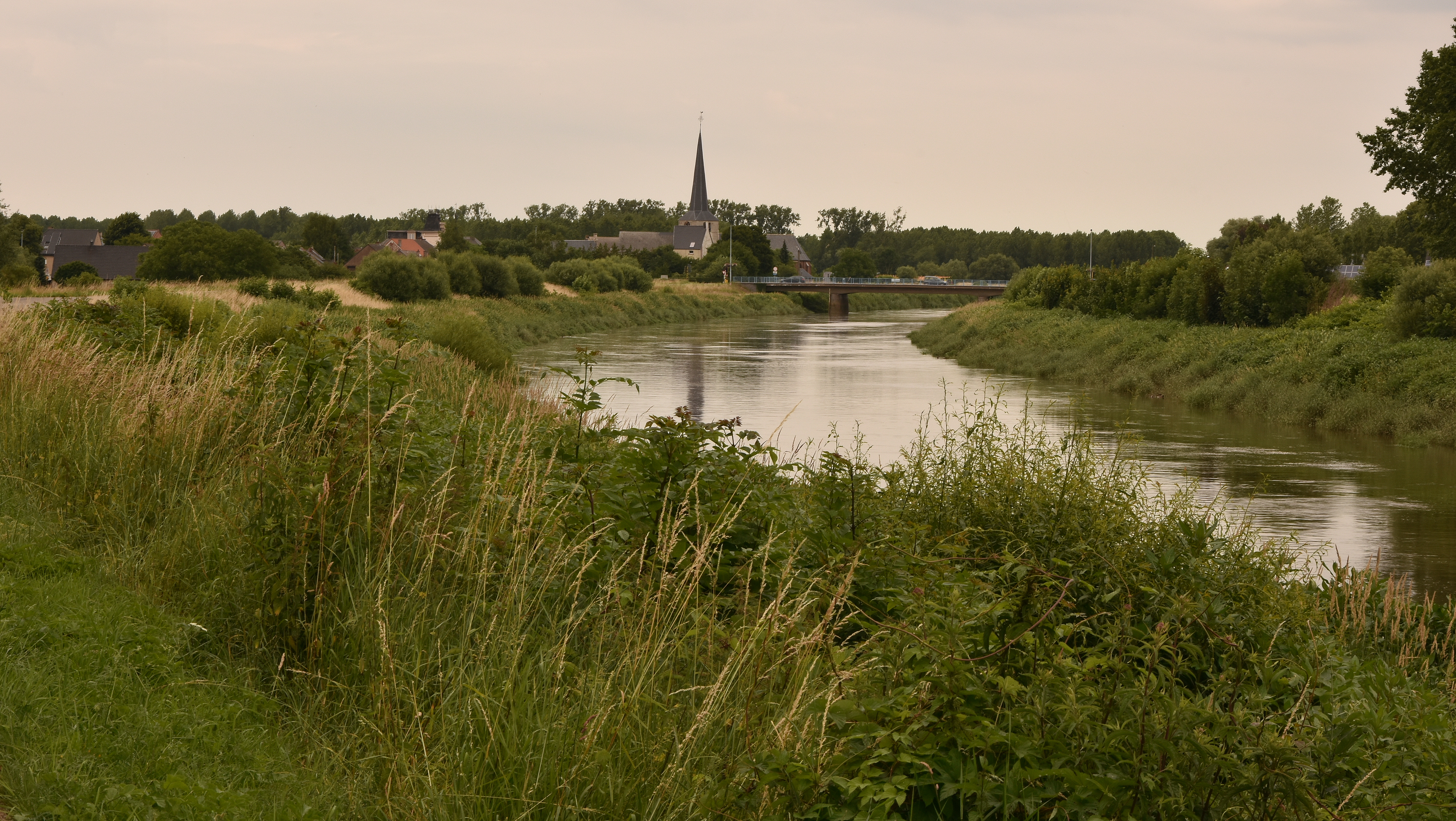 Heffen met de Zenne (vanaf de dijk te Leest) 16-06-2018